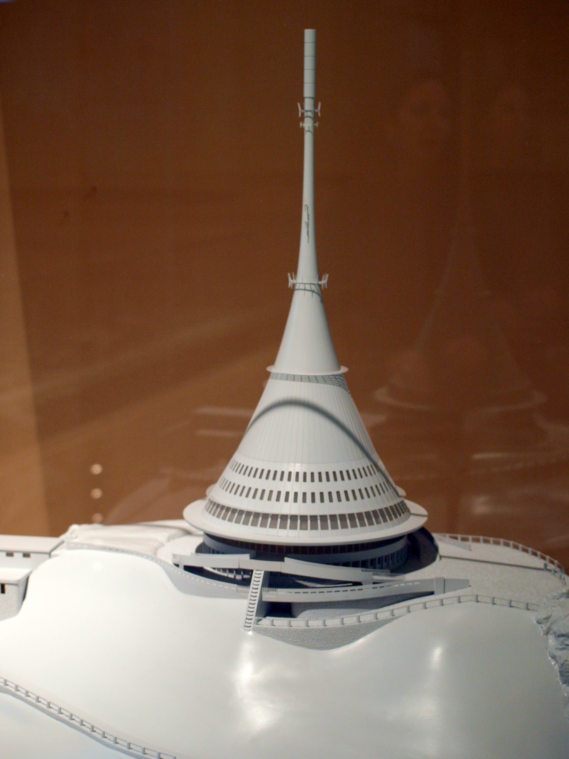 Národní technické muzeum v Praze